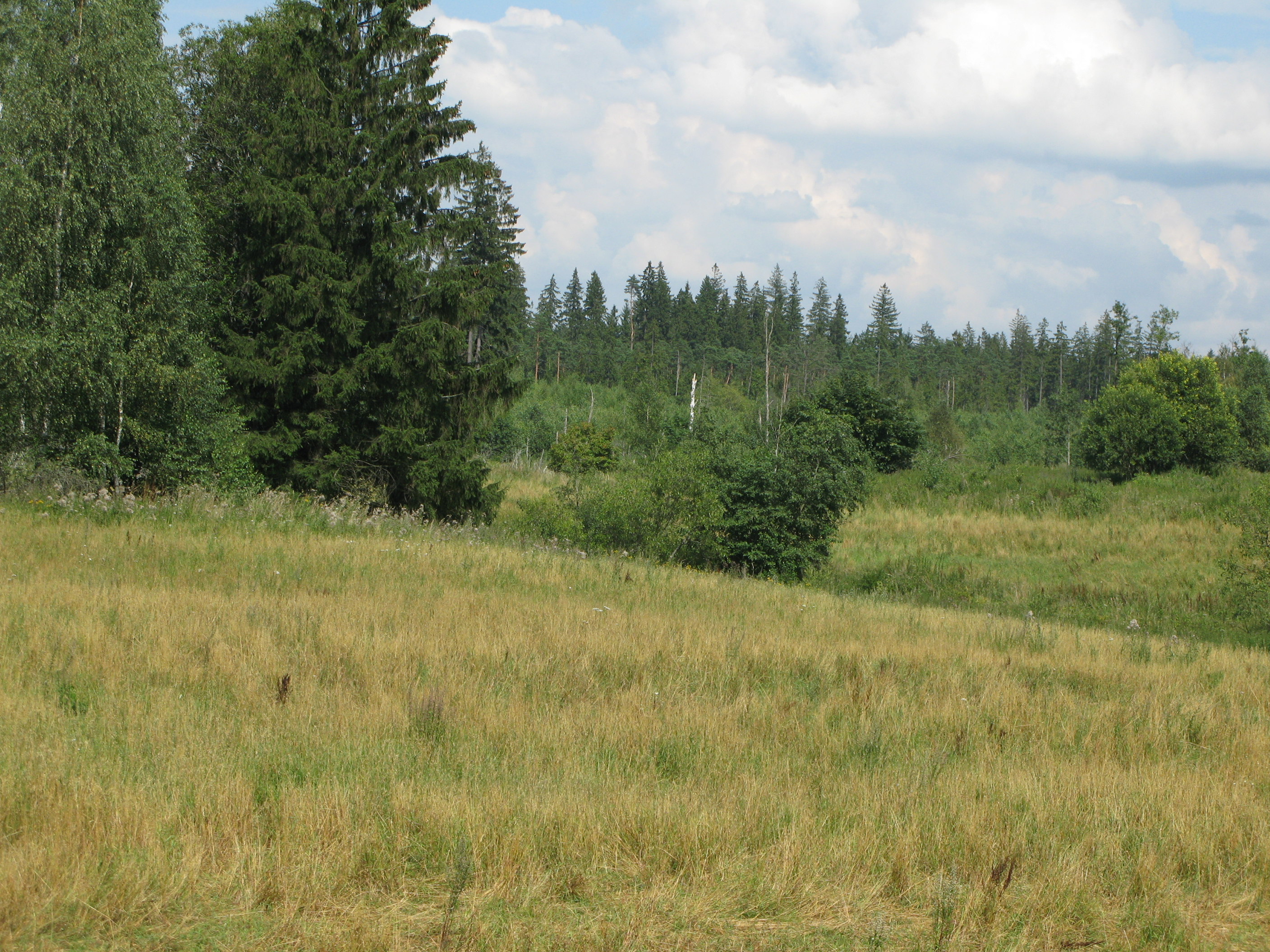 Puszcza Romincka (southern borders), powiat gołdapski